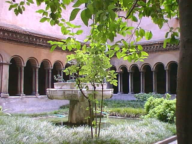 Roma, Santi Quattro Coronati: Chiostro